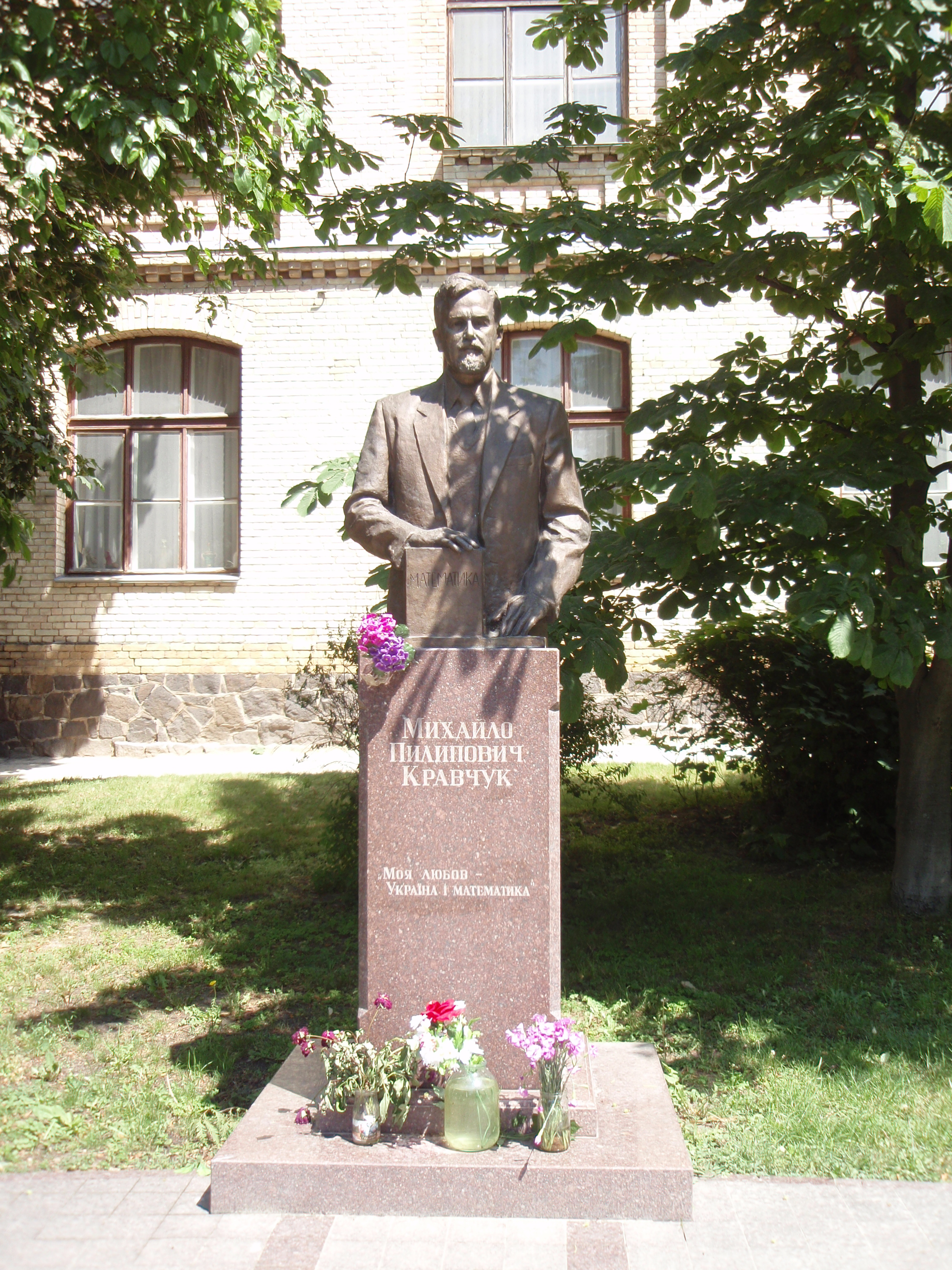 M. Krawtschuk Denkmal in NTUU KPI. Kiew, Ukraine